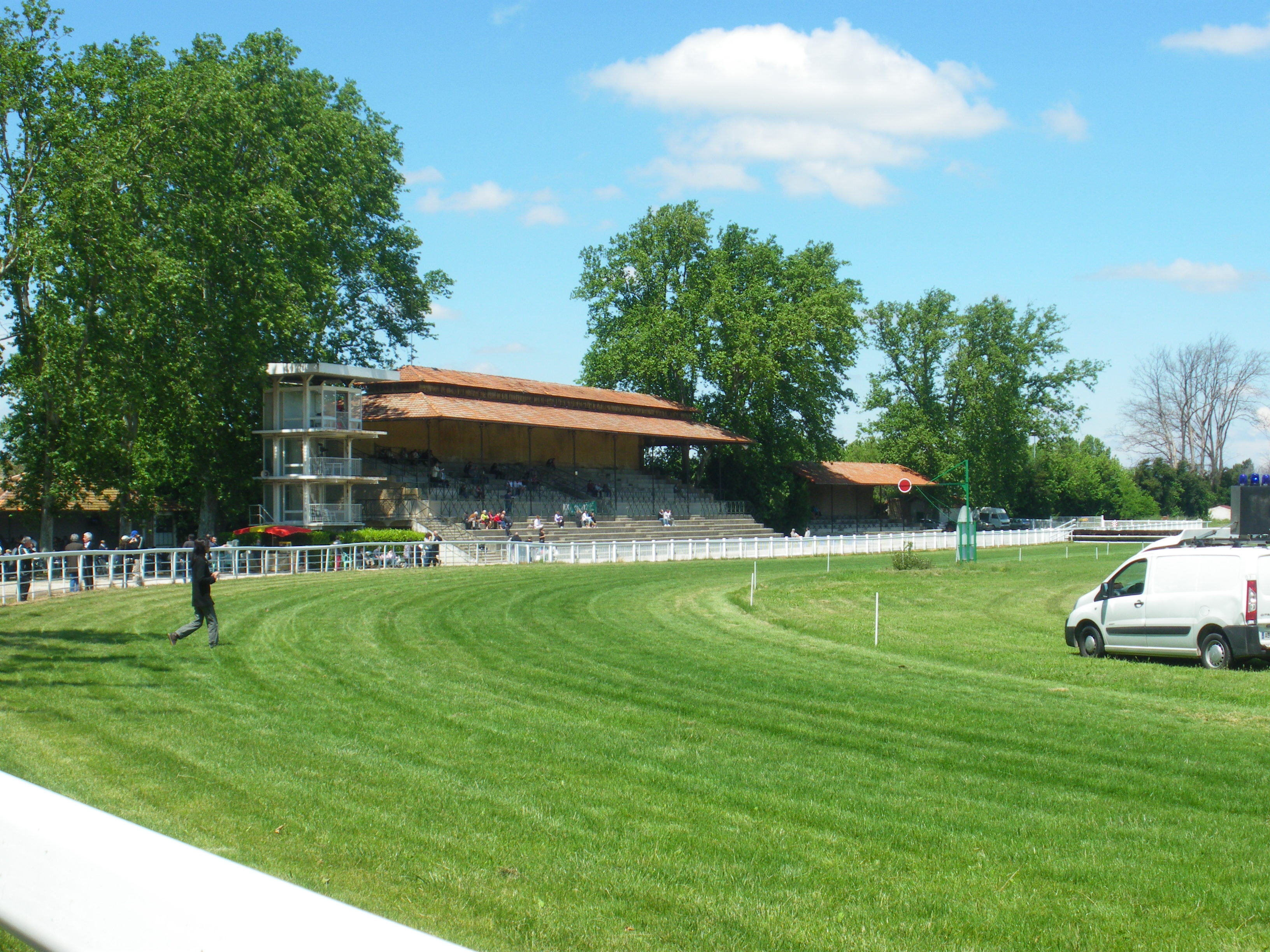 Tribunes de l'Hippodrome Roberty, Le Pontet - Vaucluse, France